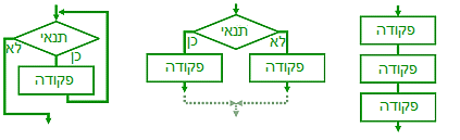 תרשימי זרימה המתארים את מבני הבקרה הבסיסיים בתכנות מובנה